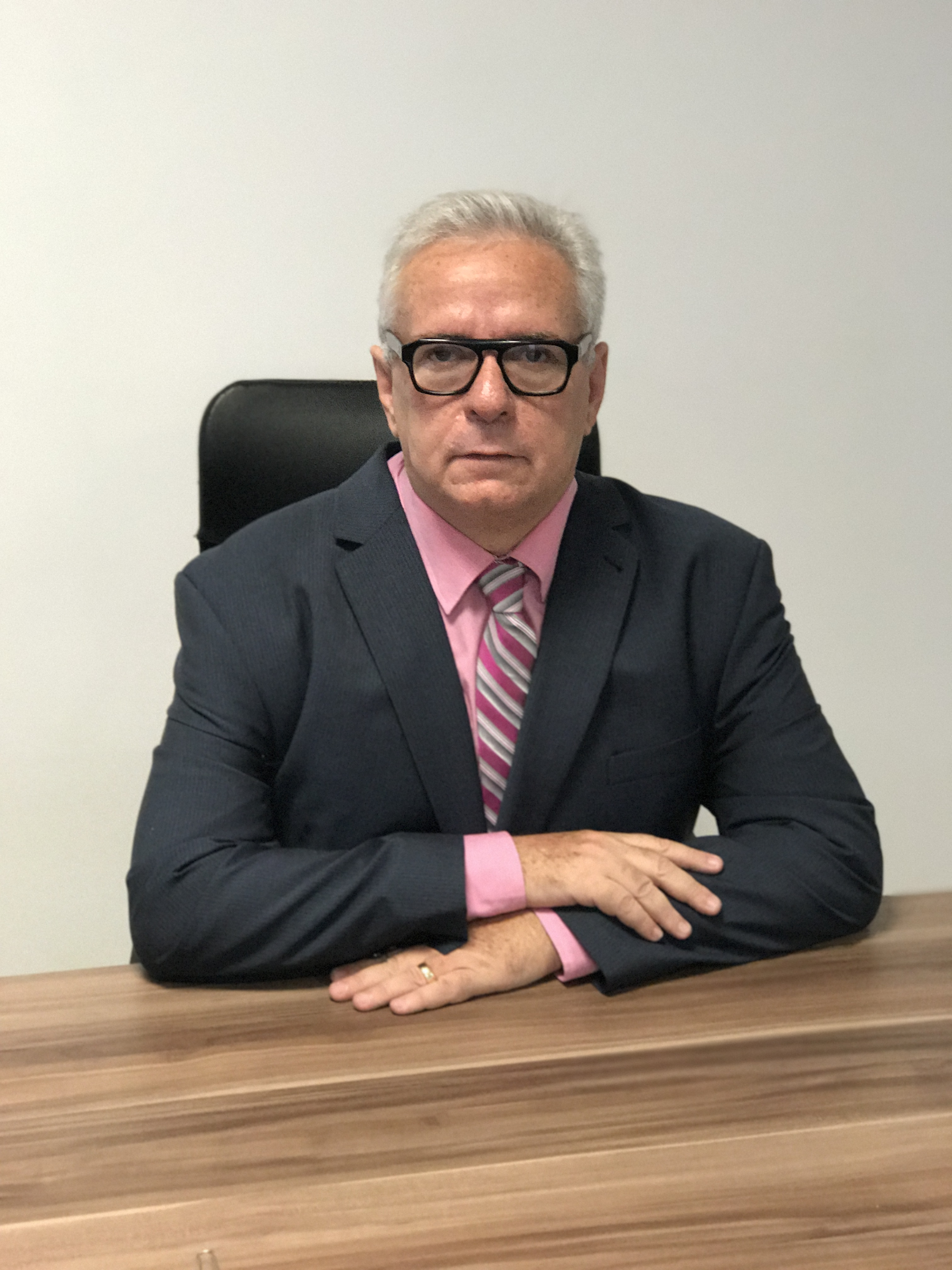 Fotografia de Juvenil Alves